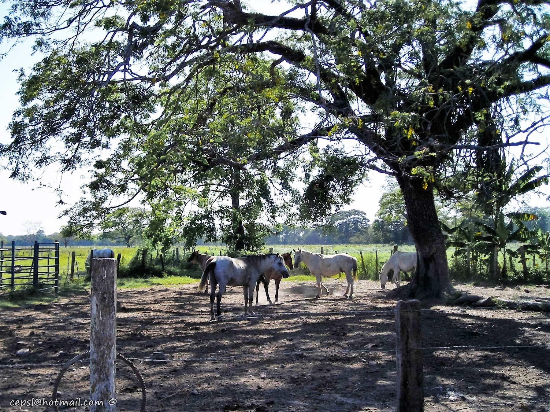 El caballo criollo, fiel compañero de trabajo del LLanero Venezolano.